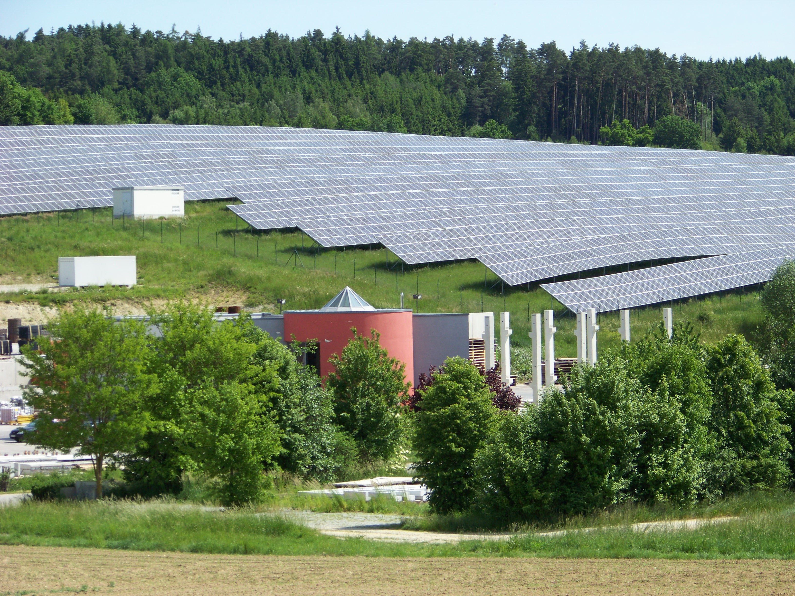 Laberweinting, Hofkirchen. Hinter dem Bürogebäude des Betonfertigteilwerks befindet sich auf einer Fläche von knapp 28.000 m² eine große Photovaltaikanlage.